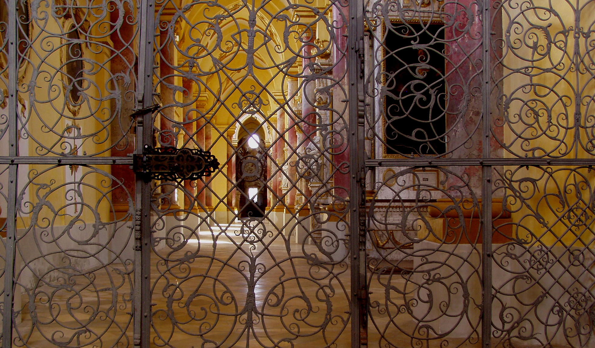 Blick durch das schmiedeeiserne Rokokogitter in das nördliche Seitenschiff der Abteikirche